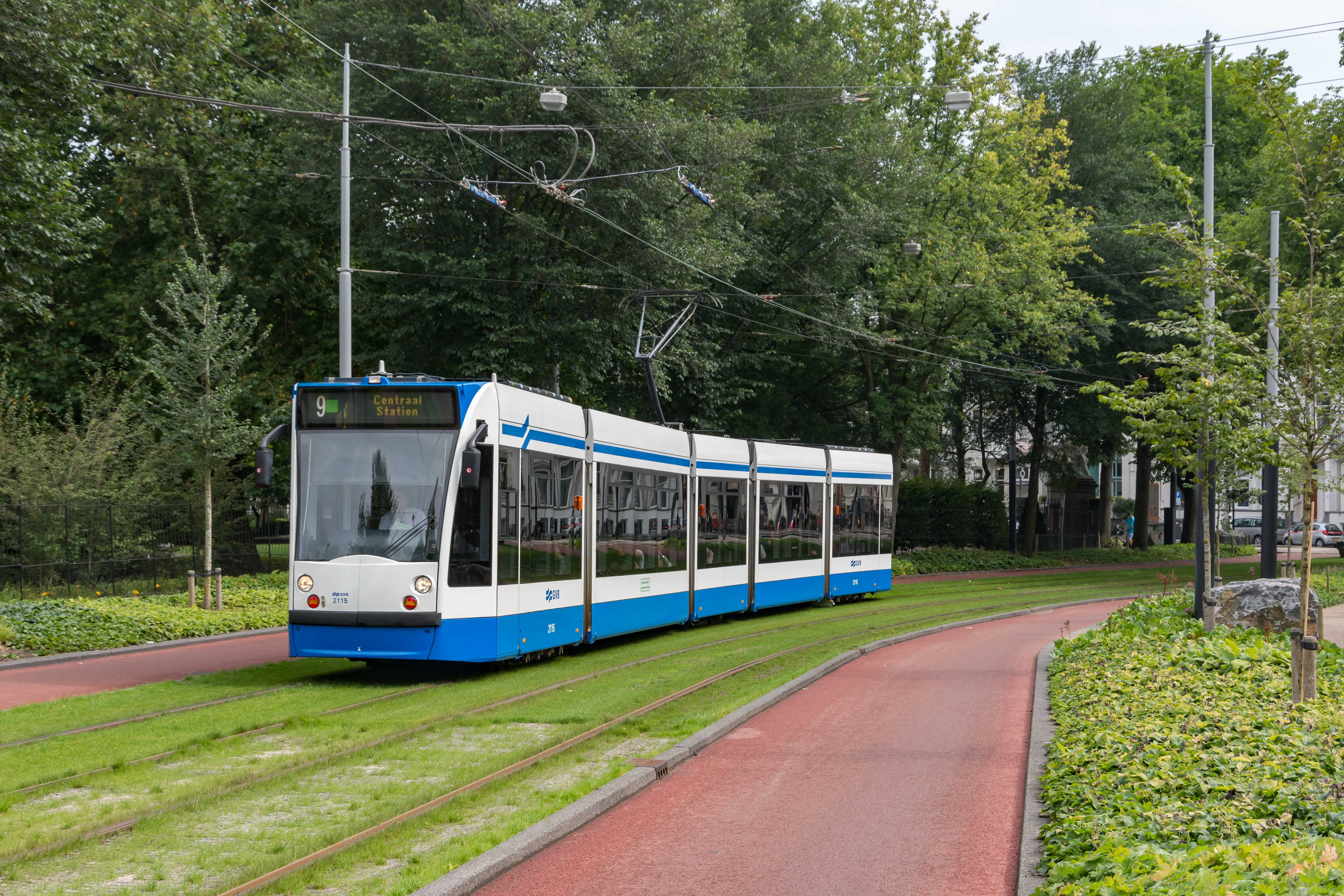 Door het Amsterdamse Wertheimpark rijdt GVB 2115 als lijn 9 naar het Centraal Station.